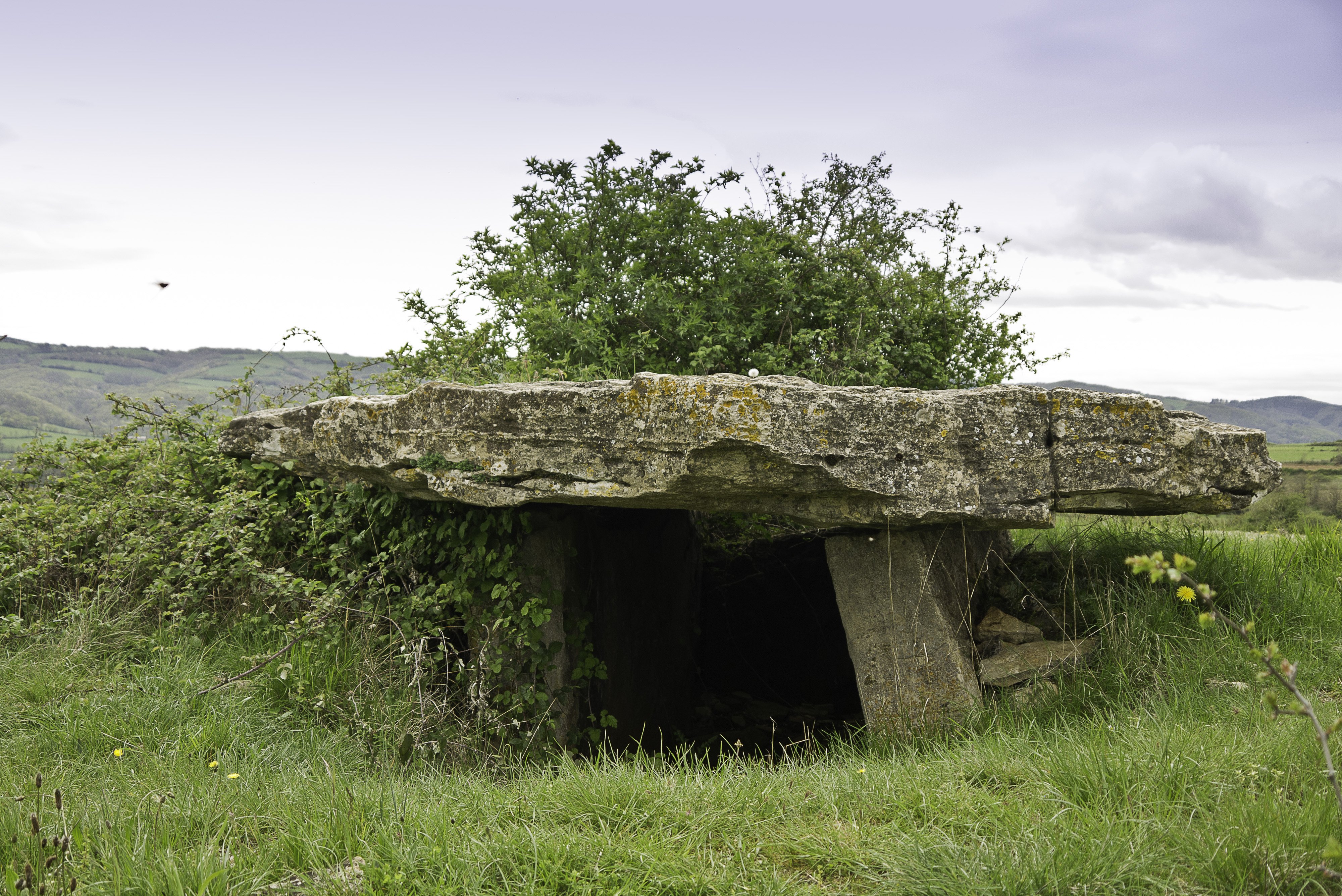 Dolmen de Saplous (Buzeins, Aveyron, France).